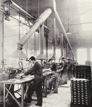 Fra radiatoravdelingen ved NOBØ i Trondheim i mellomkrigstiden.